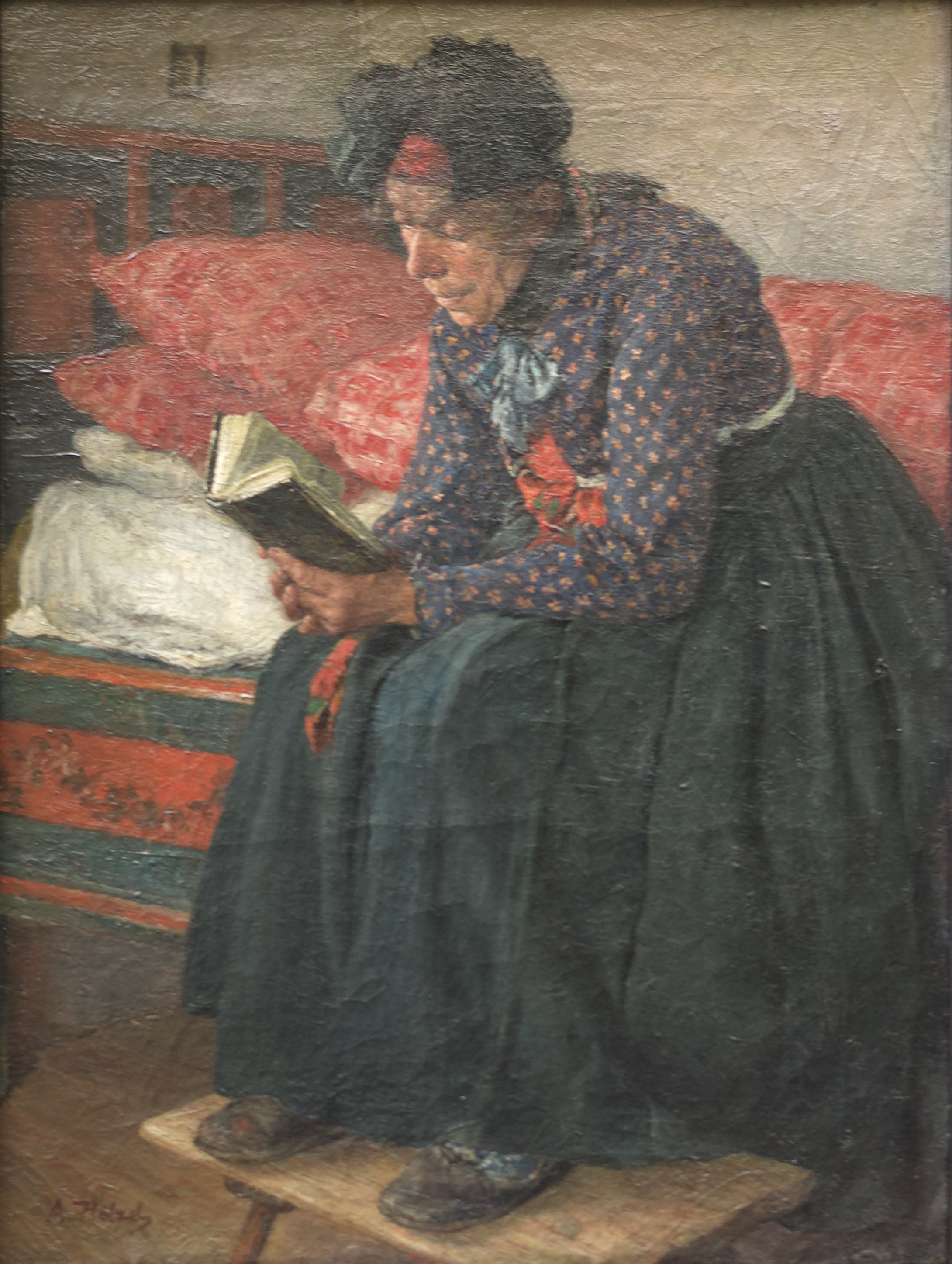 Dévotion privée, Adolf Hölzel c 1888/91. Neue Pinakothek, Munich. Inv 7891